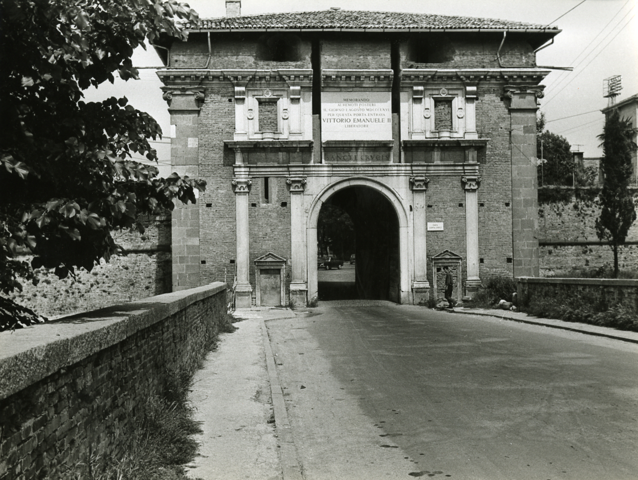 Servizio fotografico : Padova, 1967 / Paolo Monti. - Stampe: 3 : Positivo b/n, gelatina bromuro d'argento/ carta, 18x24. - ((Al verso delle stampe manoscritti i numeri dei negativi corrispondenti (formato 35 mm): 368 (lo stesso numero identifica 3 stampe); iscrizioni didascaliche manoscritte a matita: "Porta Santa Croce", "Sperone delle mura presso/ Porta S. Croce", "Porta Savonarola/ del Falconetto"; timbro a inchiostro con copyright: "© - Credit to:/ Paolo Monti/ Via T. Tasso [...]/ Milano [...]". - Sul coperchio della scatola iscrizione didascalica manoscritta a pennarello nero: "Bologna/ Città storiche". - Occasione: Documentazione per la pubblicazione: Diego Valeri (a cura di), "Padova: i secoli, le ore", Bologna, Edizioni Alfa, 1967. - Fonte: Monografia di Valeri Diego (a cura di): Padova: i secoli, le ore, Bologna, Edizioni Alfa (1967). - Fonte: Agenda di Paolo Monti: Monti/ 3 aprile 1966 - 9 marzo 1971/ 12421-16823 (1966-1971), presso Archivio Paolo Monti